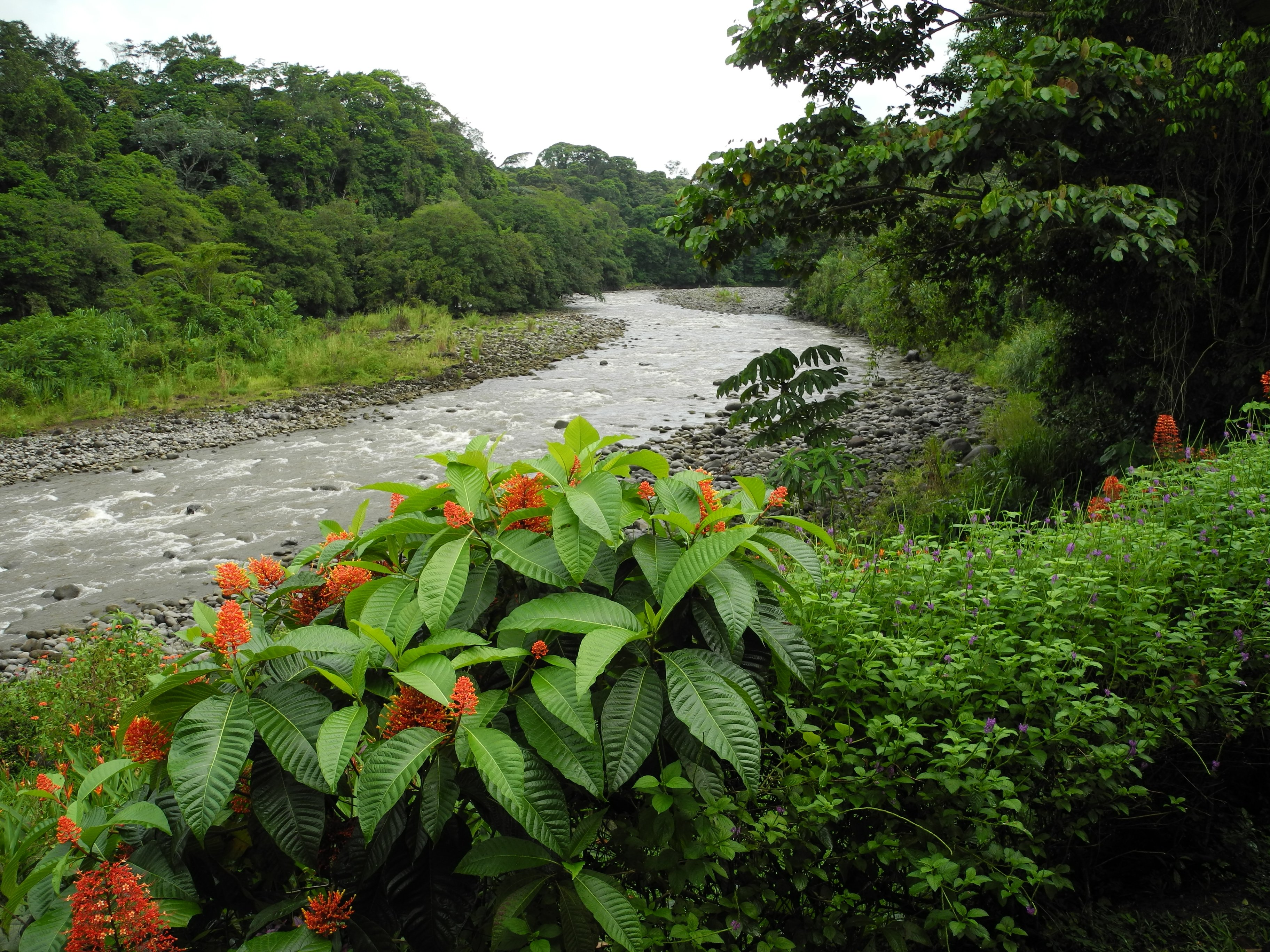 El río Sarapiquí en Costa Rica se destaca por su ecología y su belleza natural.